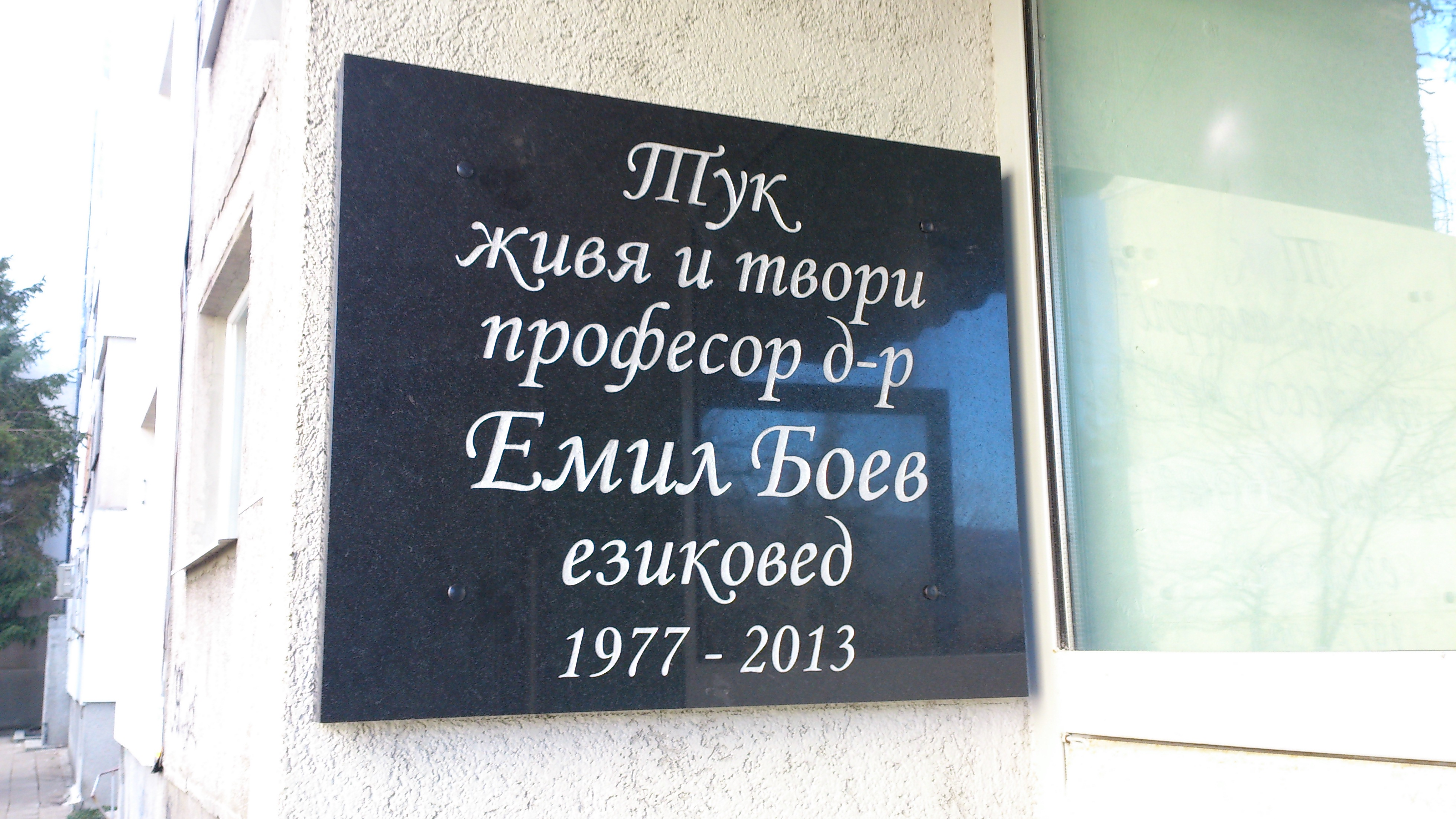 Паметна плоча пред дома на проф. Емил Боев.